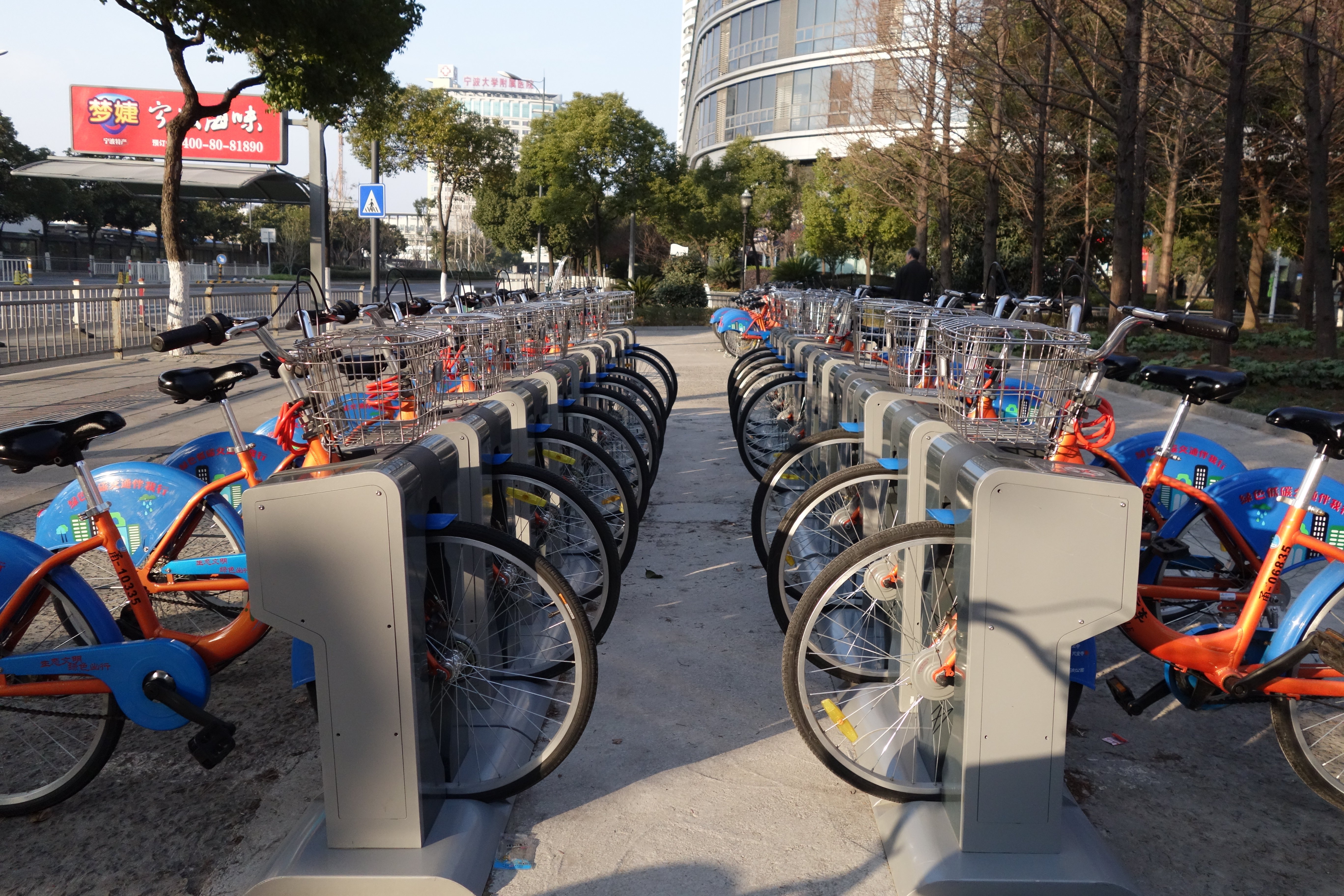 宁波美术馆附近的一处公共自行车租赁点